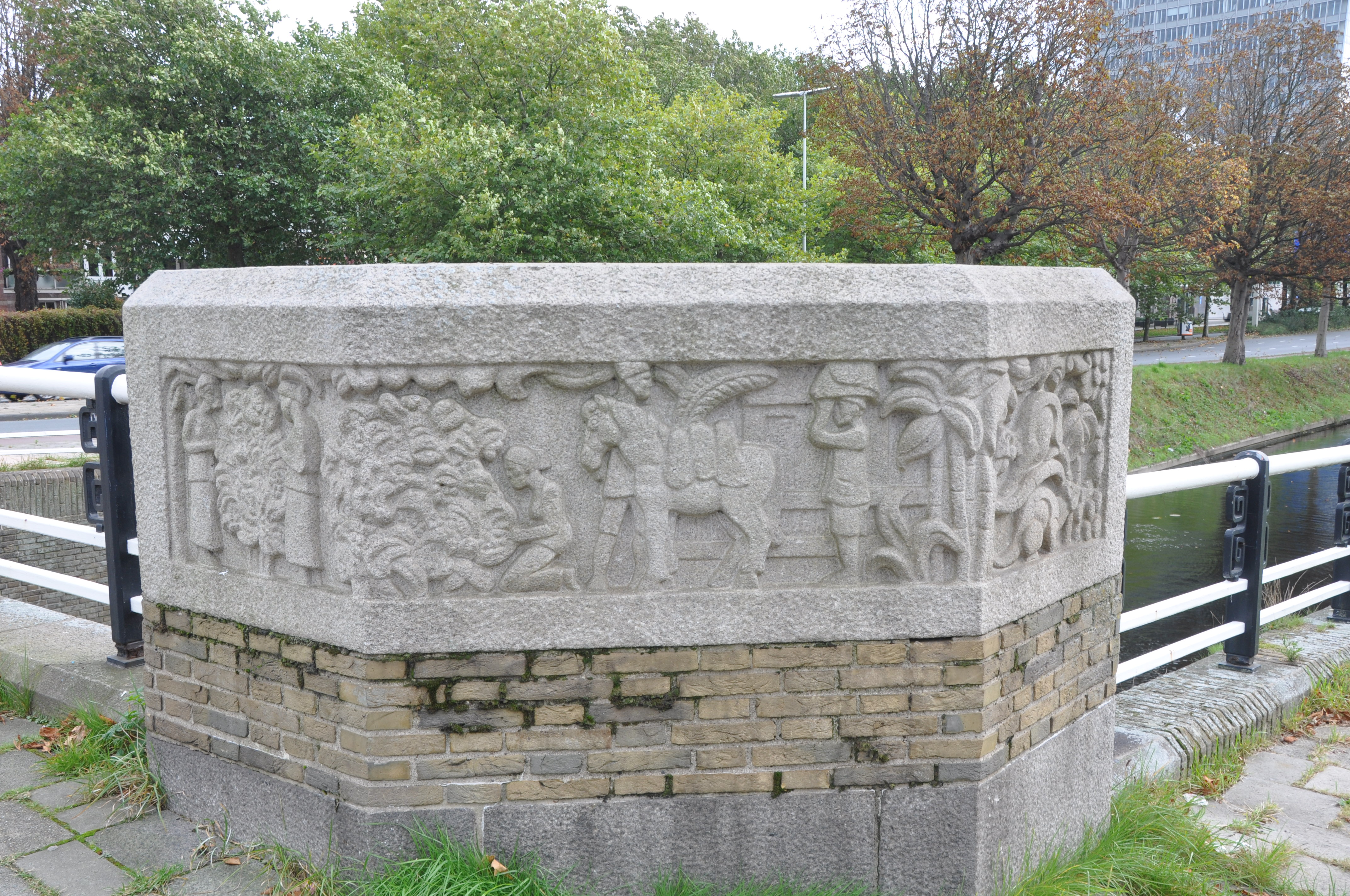 Bruggen in Den Haag.